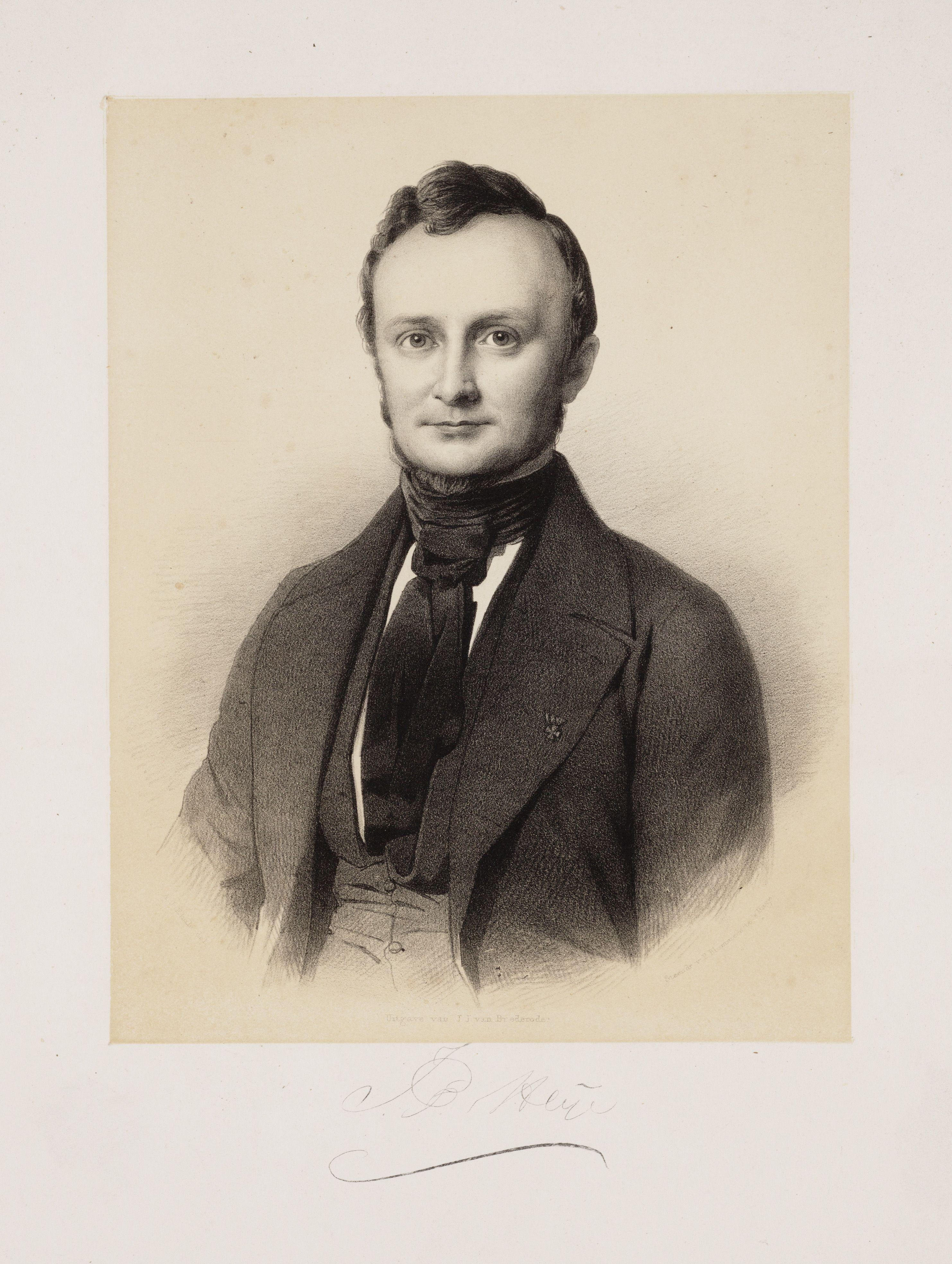 Beschrijving Jan Pieter Heije (1809-1876) Geneesheer; dichter Documenttype prent Vervaardiger Brederode, J.J. van (uitgever) Blommers, P. Ehnle, A.J. (tekenaar) Collectie Collectie Atlas Dreesmann Inventarissen Afbeeldingsbestand 010094007544